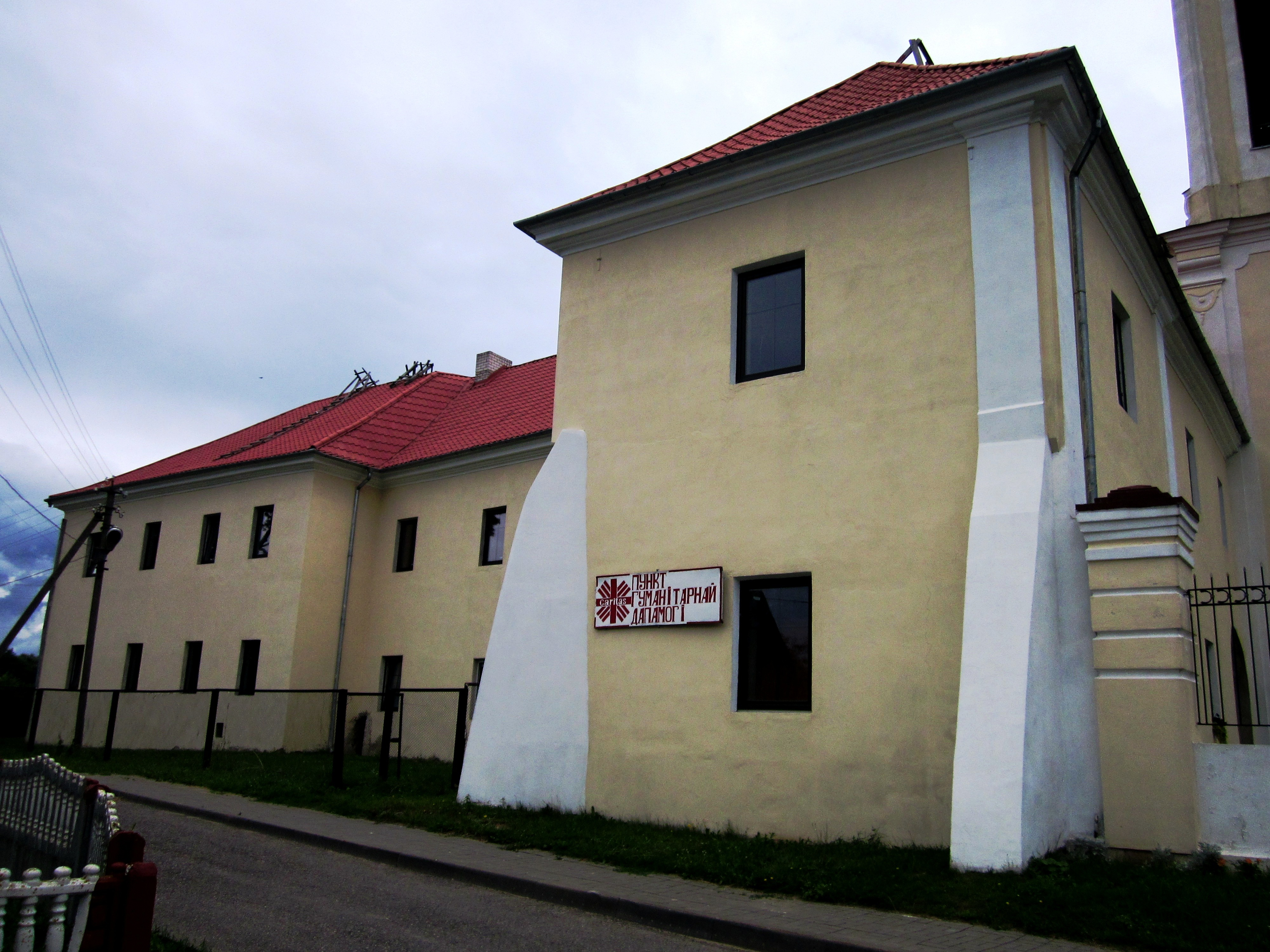 Беларуская (тарашкевіца): Ансамбаль былога кляштару бэрнардынцаў:Петрапаўлаўскі касьцёл, галоўны алтар касьцёлу, былы жылы корпус, агароджа. г. Іўе This is a photo of Belarusian heritage monument. Reference number: 412Г000286 ( WLM)